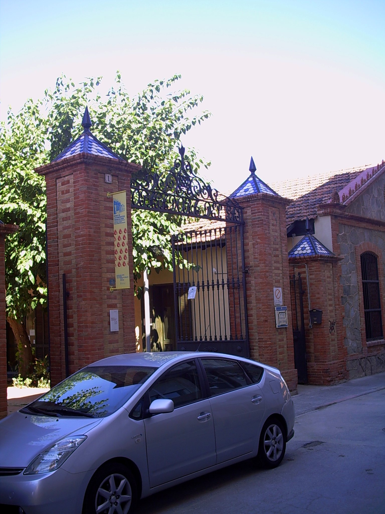 Porta de l'antiga fàbrica del gas, a Premià de Mar, comarca del Maresme, (Catalunya). Seu del Museu de l'Estampació Tèxtil. És l'única fàbrica de gas d'hulla que resta d'empeus, a Catalunya, i ha estat rehabilitada recentment per acollir el Museu, per l'arquitecte Rafael de Cáceres.